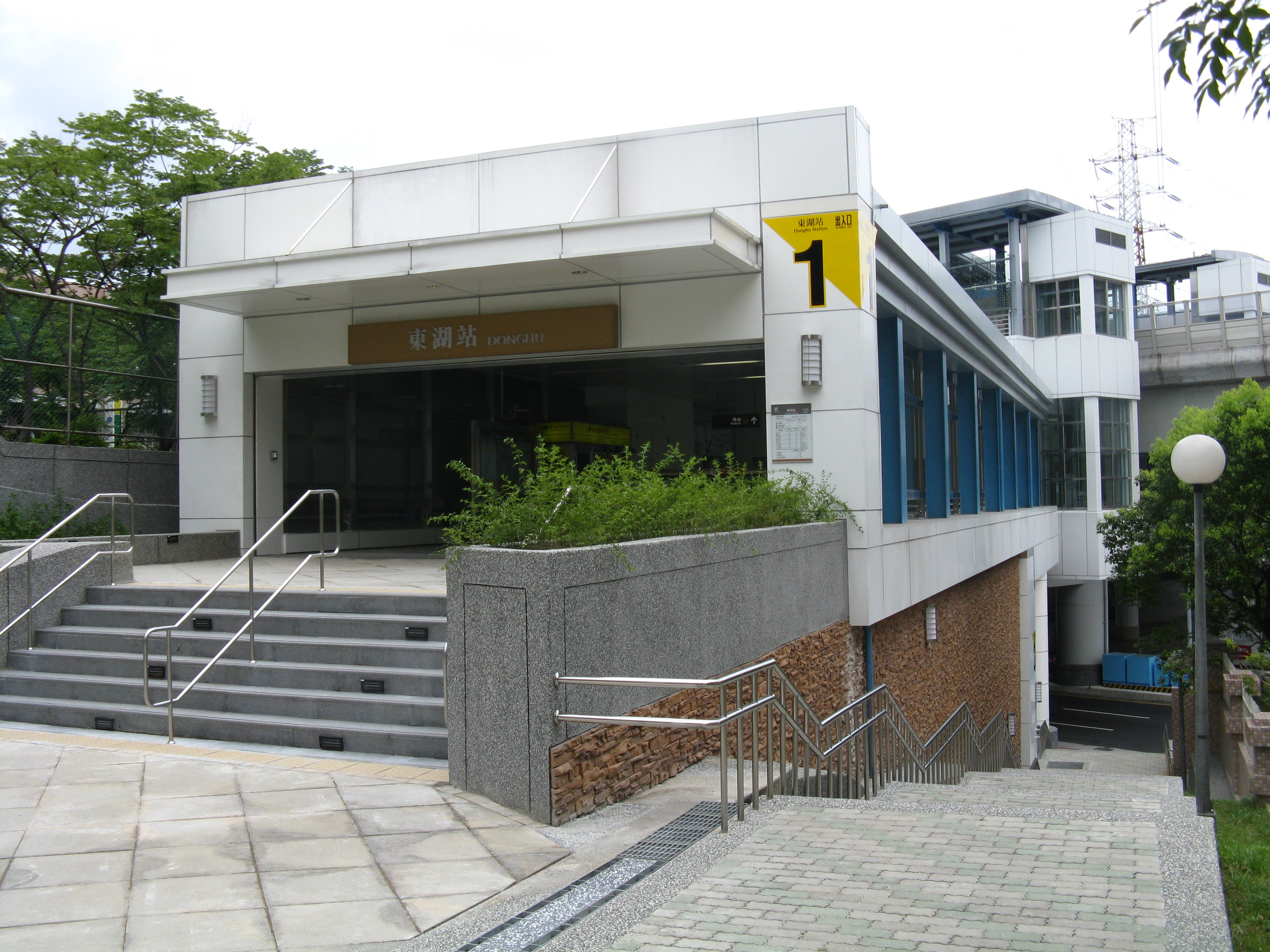 台北捷運内湖線東湖駅1号出口と駅舍。